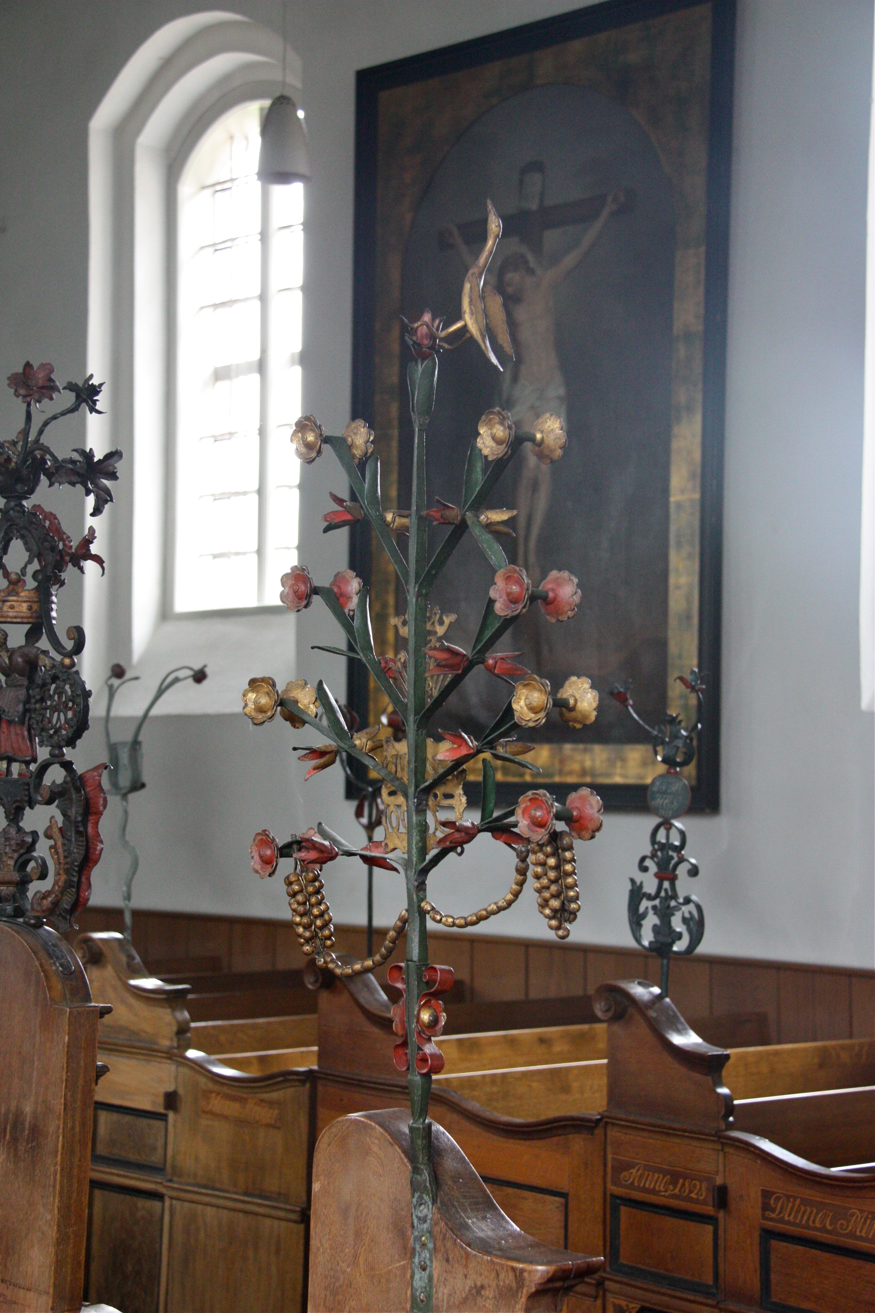 Sankt Johannis, Hamburg-Neuengamme, HutständerThis is a photograph of an architectural monument.